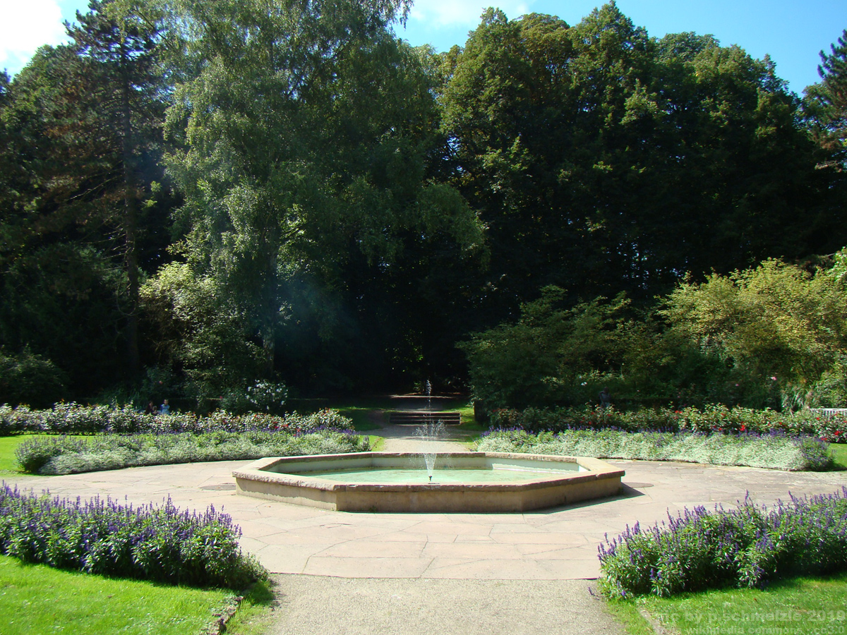 Brunnenbecken im Pfühlpark in Heilbronn